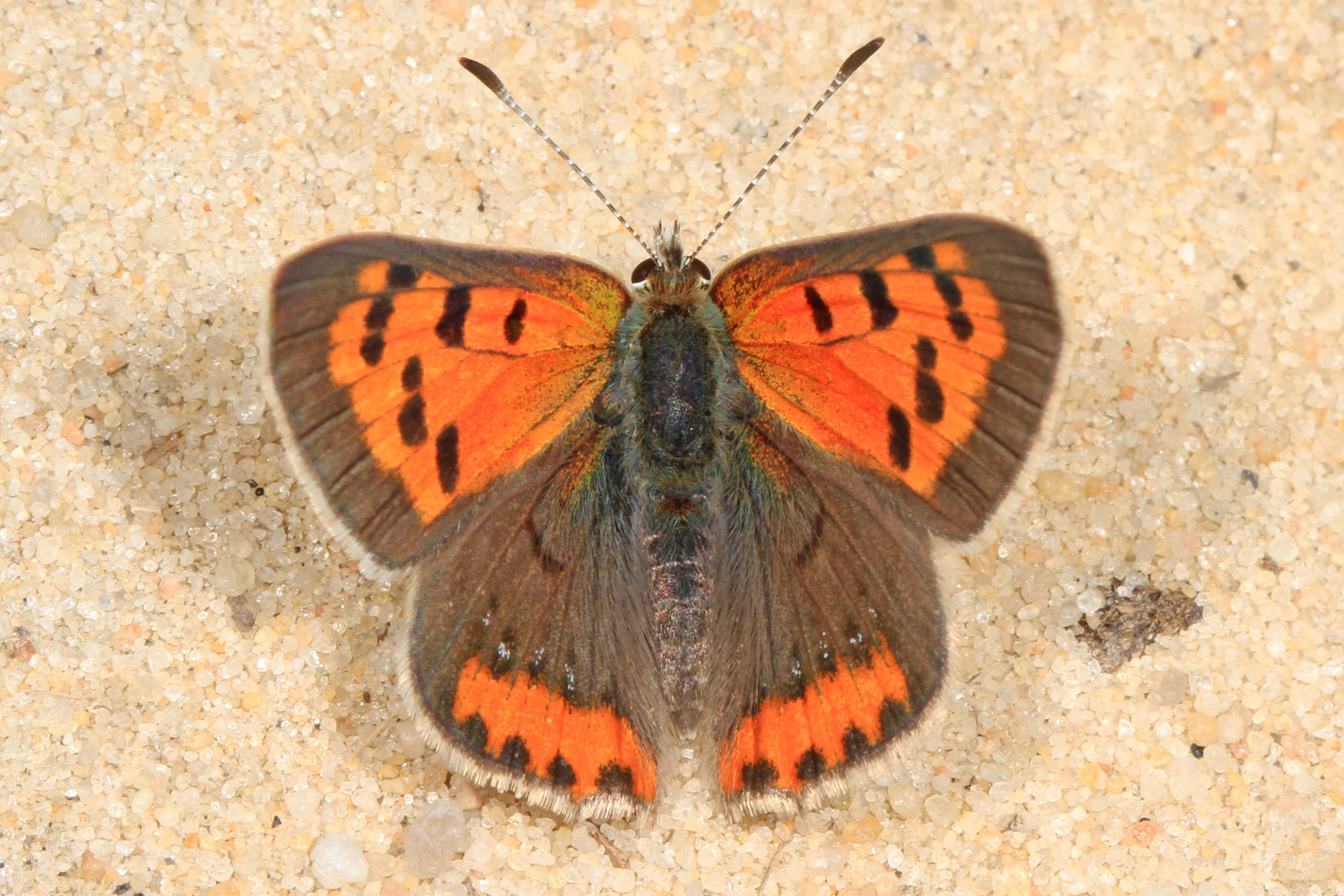 Lycaena phlaeas, female